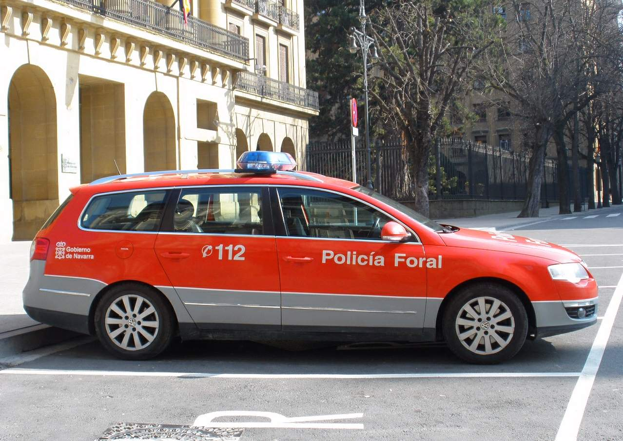 Vehículo de la Policía Foral de Navarra, estacionado frente al Palacio de Navarra (Gobierno autonómico), en Pamplona